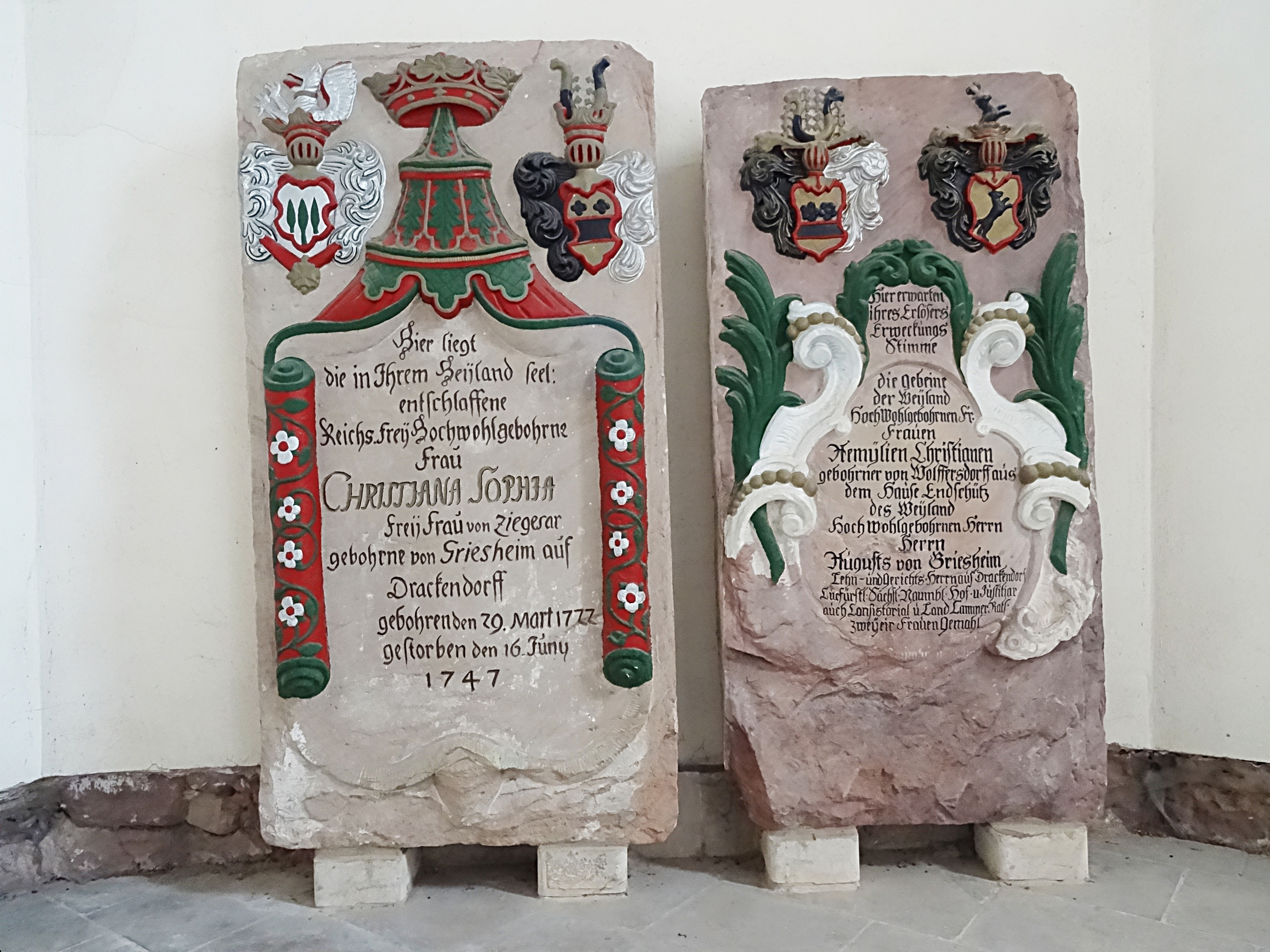 Sandsteinepitaphe von Christiane Sophie von Ziegesar (geb. von Griesheim) und Amalie Christiane von Griesheim (geb. von Wolfersdorf) in der Auferstehungskirche Drackendorf